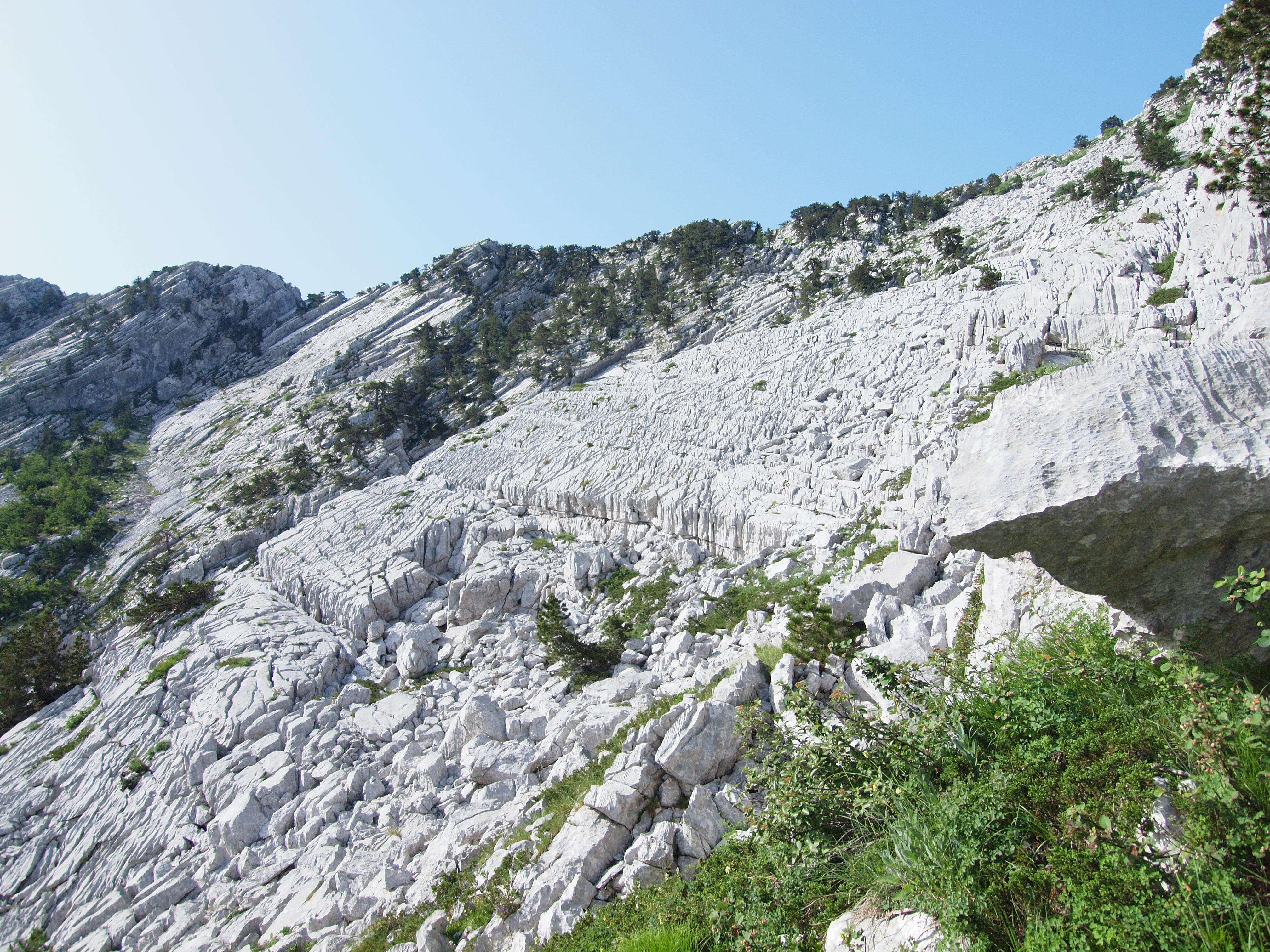 Karren at Reovacka greda Copyright (c) 2002 Pavle Cikovac.